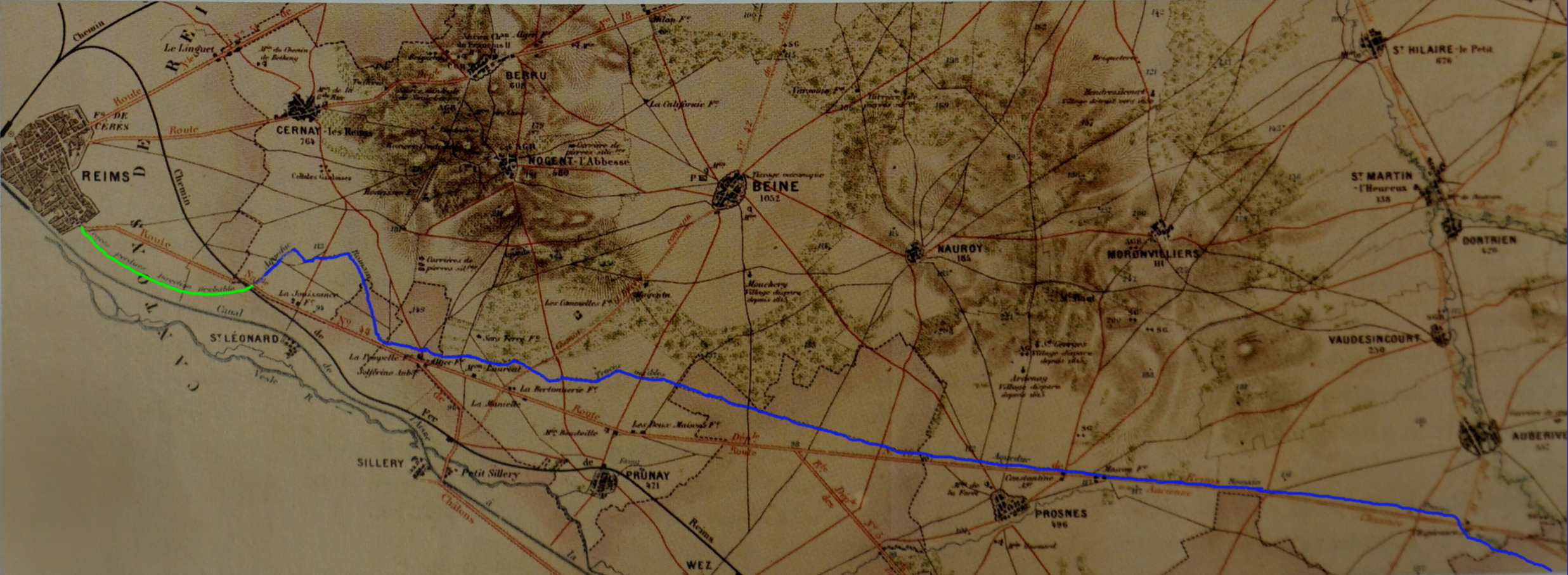 d'après une carte de Poinsignon de 1874 Carte aqueduc en bleu.